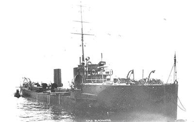 Der britische Zerstörer HMS Blackwater, Ursprungsform der River-Klasse